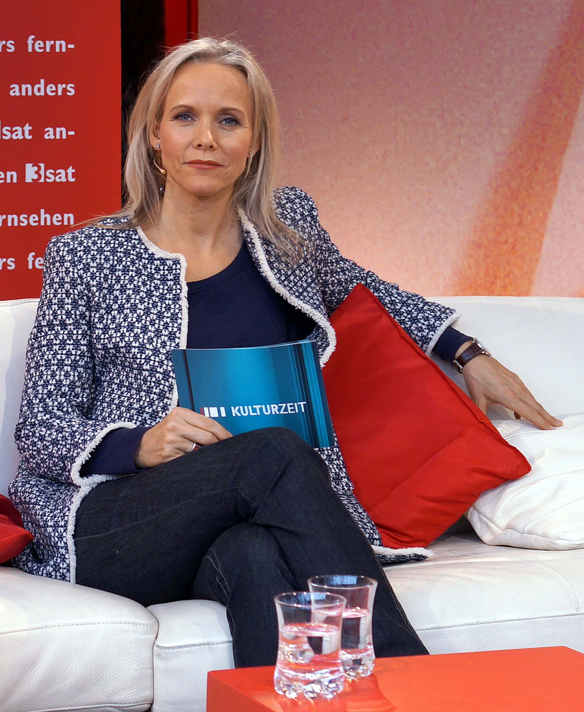 Andrea Meier auf der 3sat-Kulturzeit-Bühne zur Leipziger Buchmesse 2016